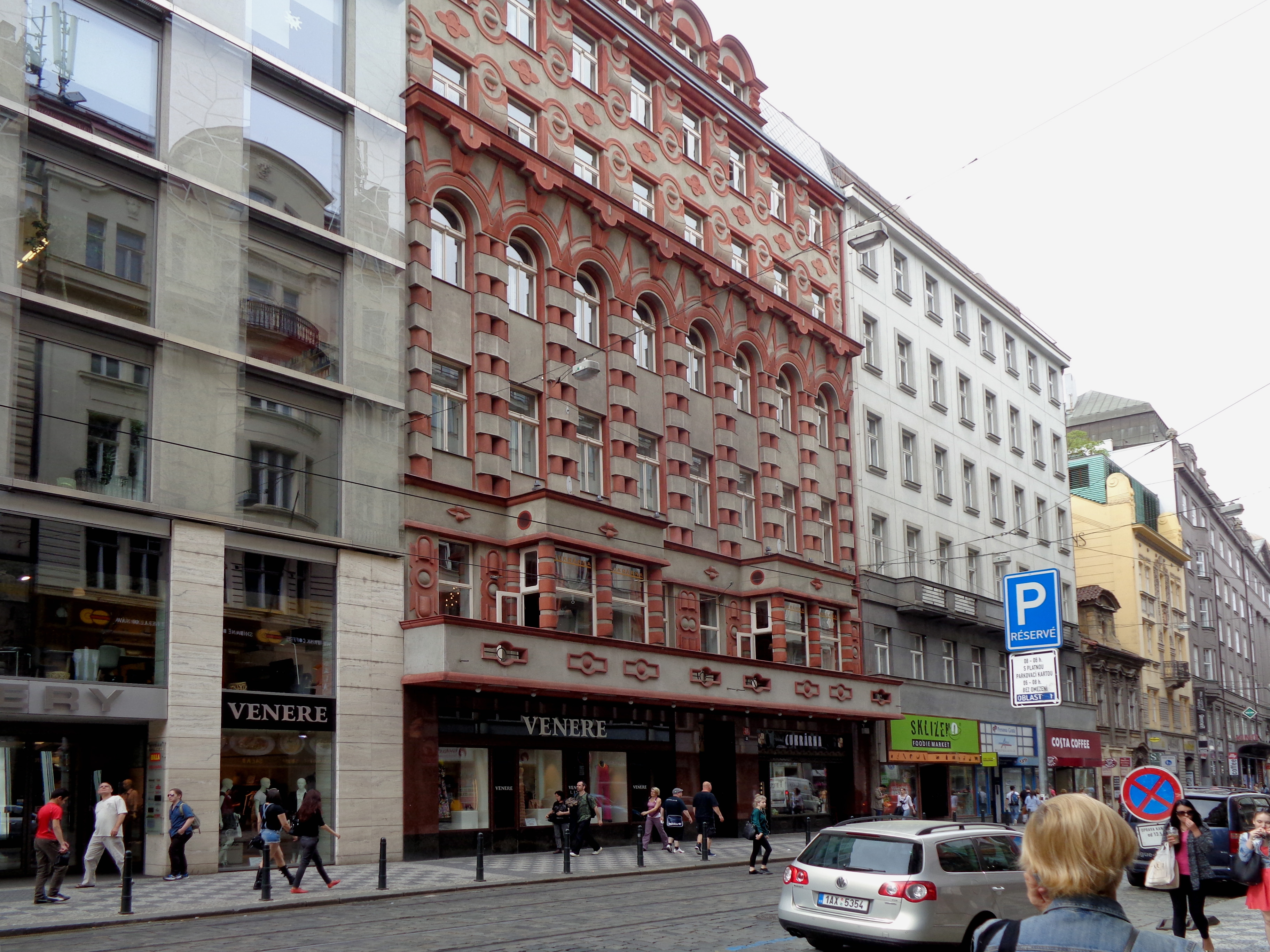 Fasada domu Frant. Myšáka - Praha Vodičkova ulice